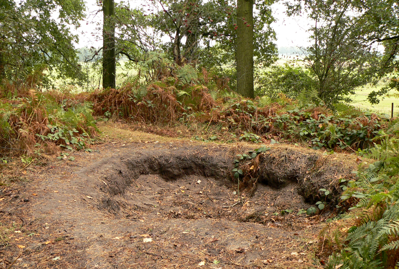 Burg Heeßel